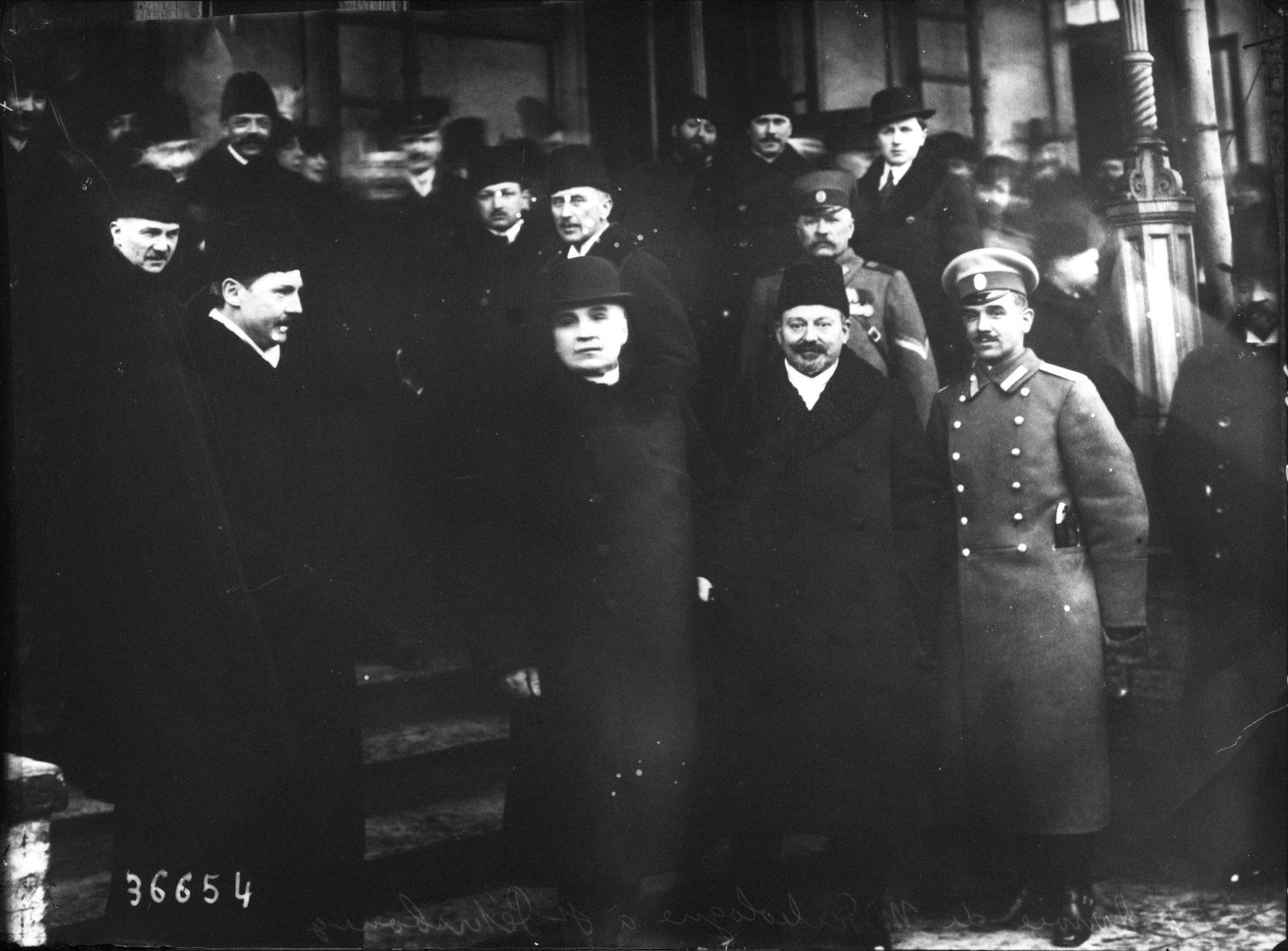 Maurice Paleologue llega como embajador francés a San Petersburgo.